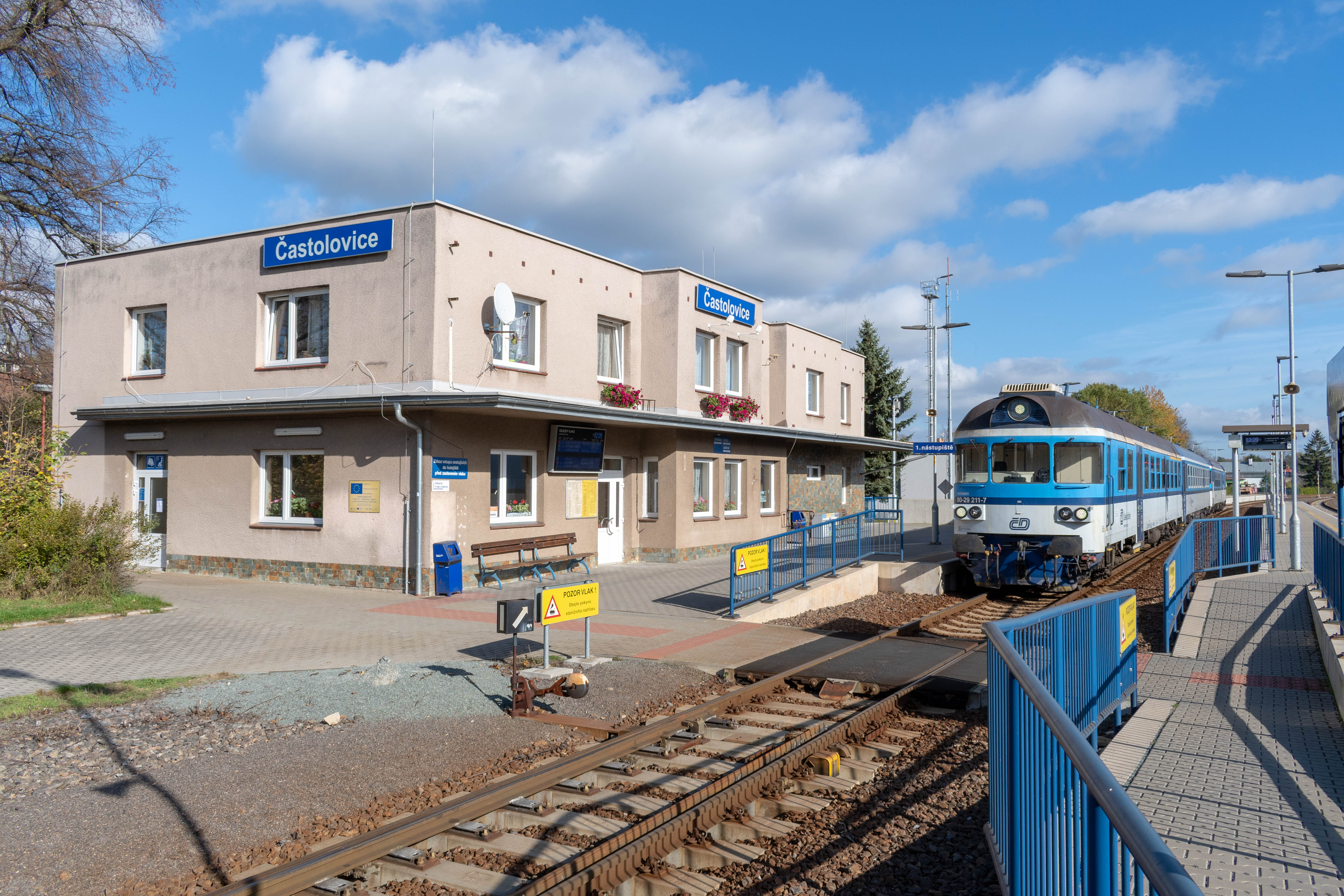 Železniční stanice Častolovice